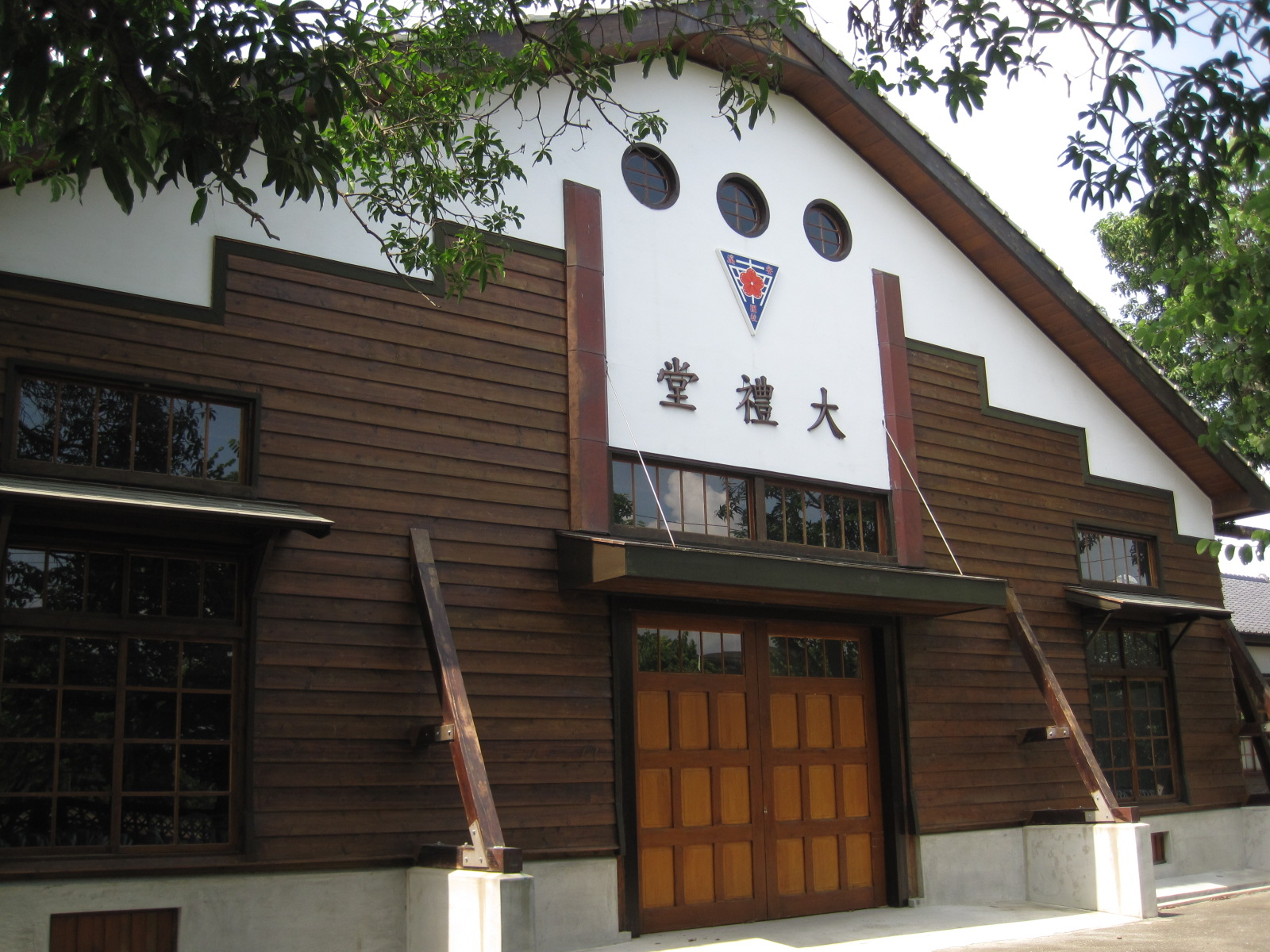 中文（台灣）: 臺灣臺南市後壁區安溪國小禮堂